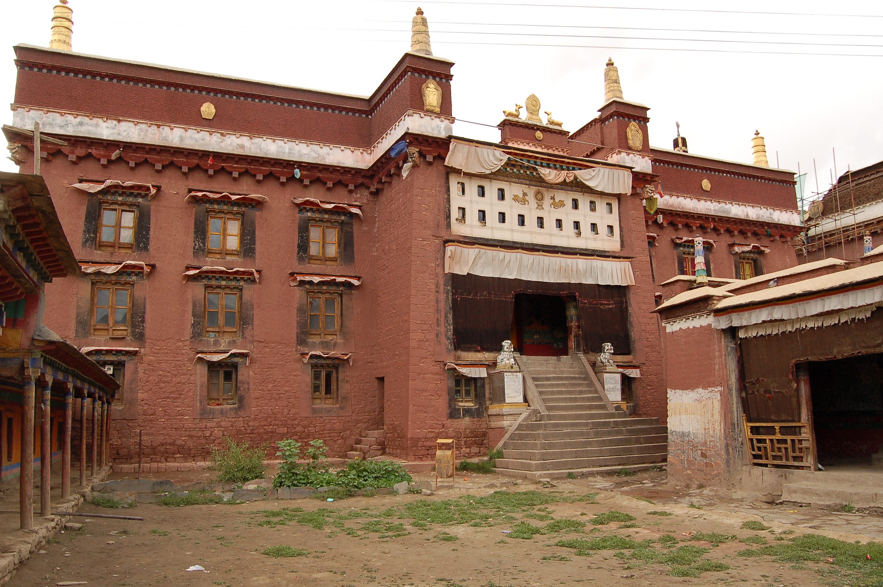 Sakya, Haupttempel des Südklosters